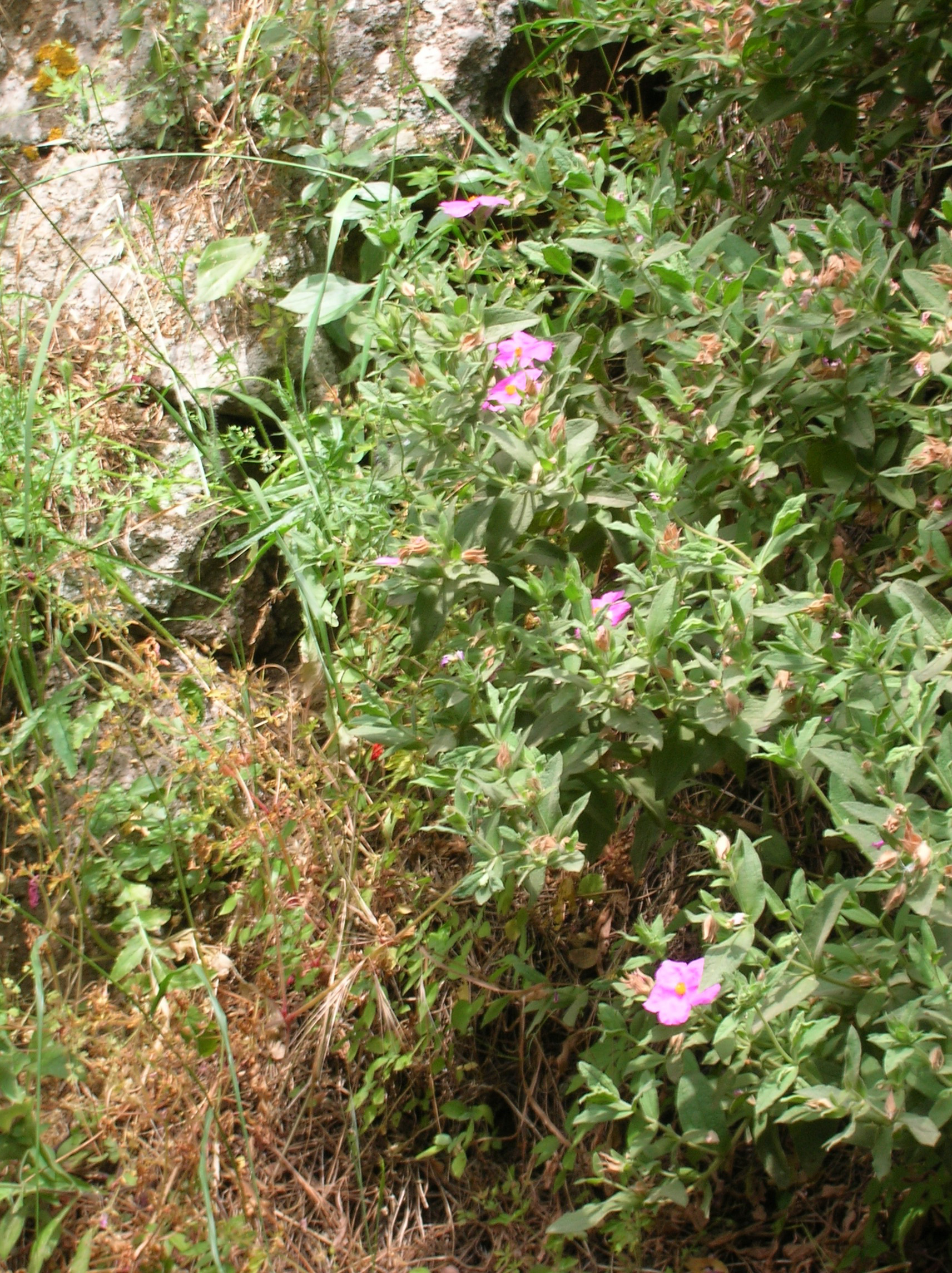 Cistus creticus nella Necropoli della Banditaccia (Cerveteri) (Italia)